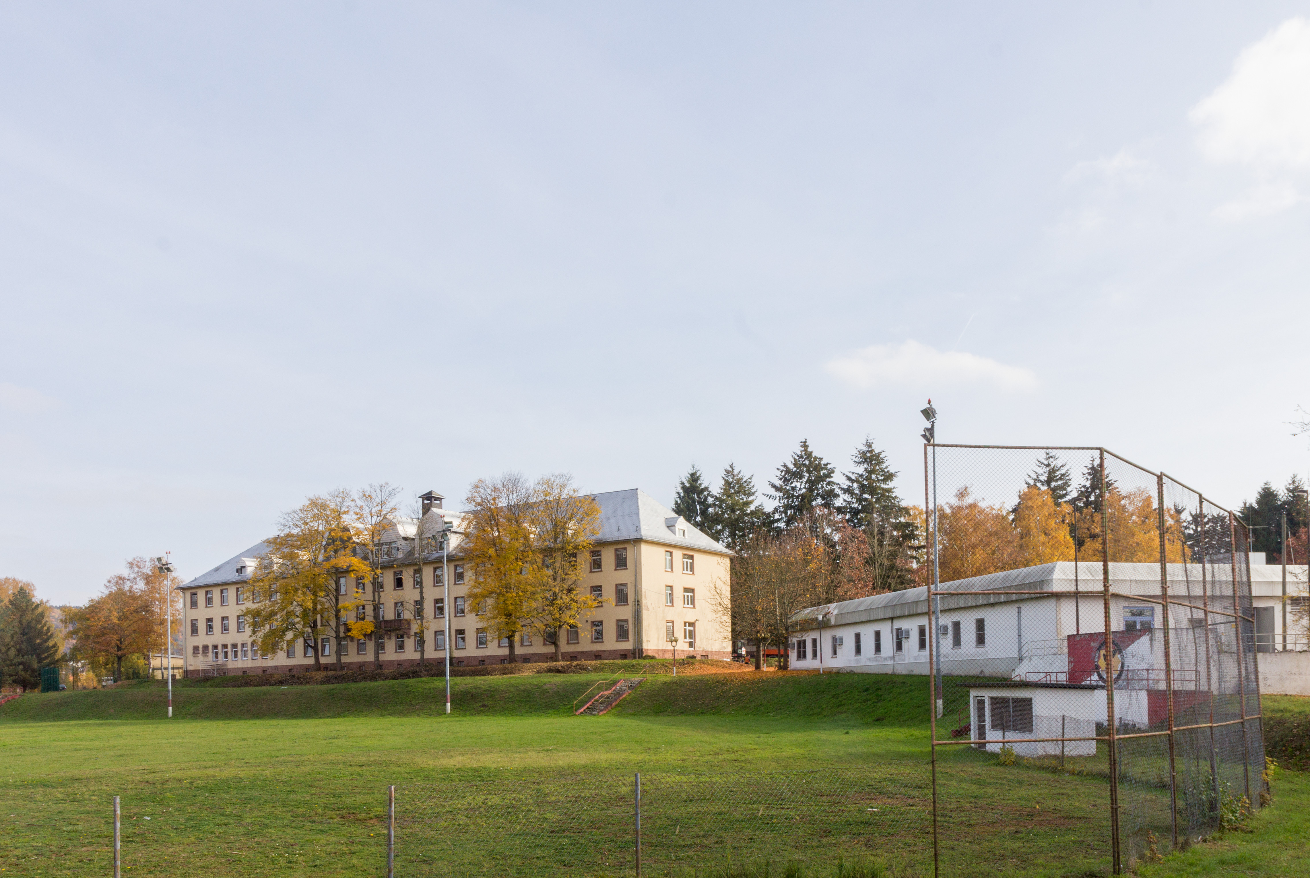 Ehemalige Armstrong-Kaserne in Büdingen, Hessen, Deutschland kurz vor der Inbetriebnahme als Erstaufnahmelager für Flüchtlinge.